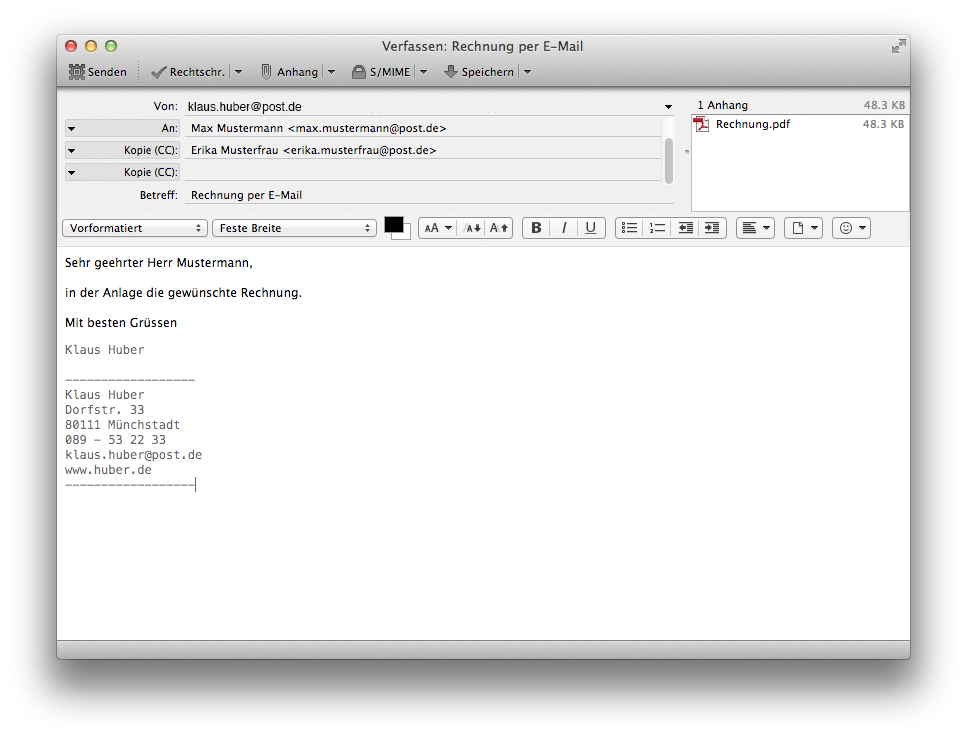 Screenshot E-Mail schreiben mit Mozilla Thunderbird